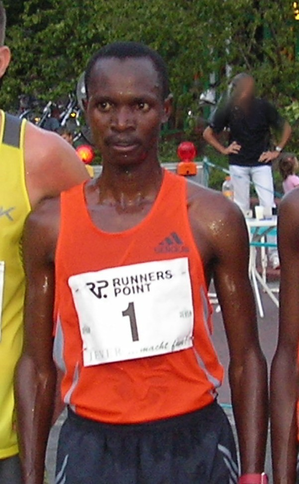 Rodgers Rop